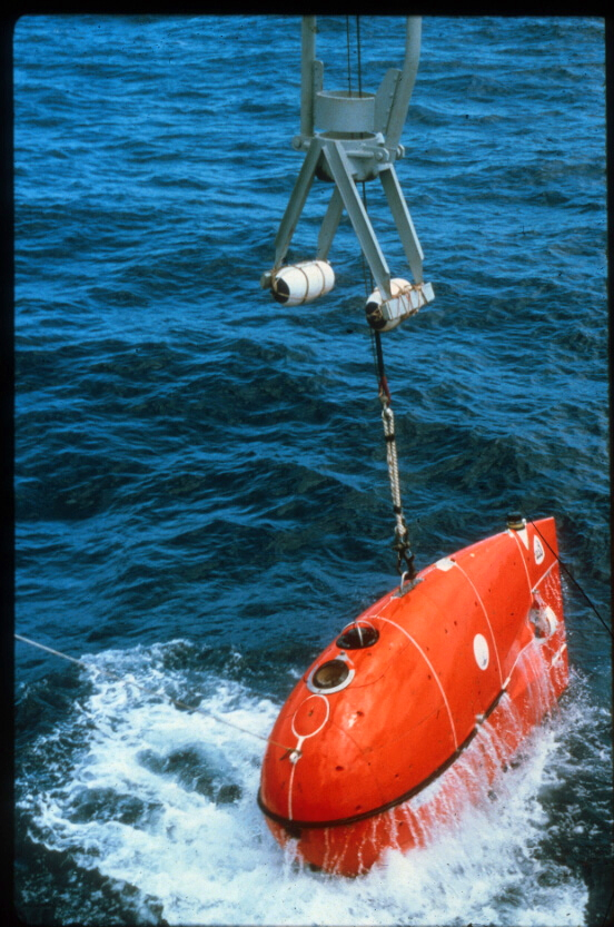 Engin autonome pour prises de vue utilisé sur le N/O Jean Charcot - Mission NIXO 45 - Pacifique équatorial nord - Ifremer